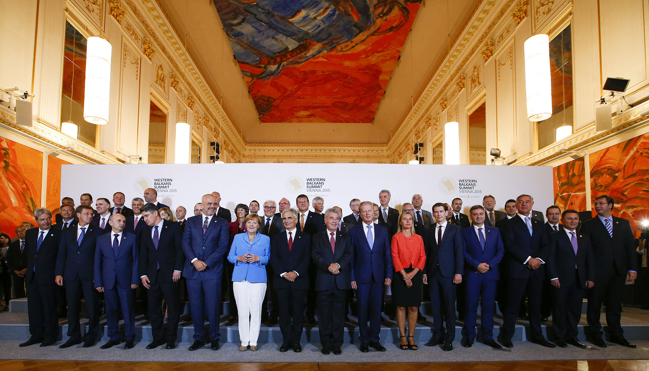 Westbalkankonferenz. Wien. 27.08.2015, Foto: Andy Wenzel/BKA